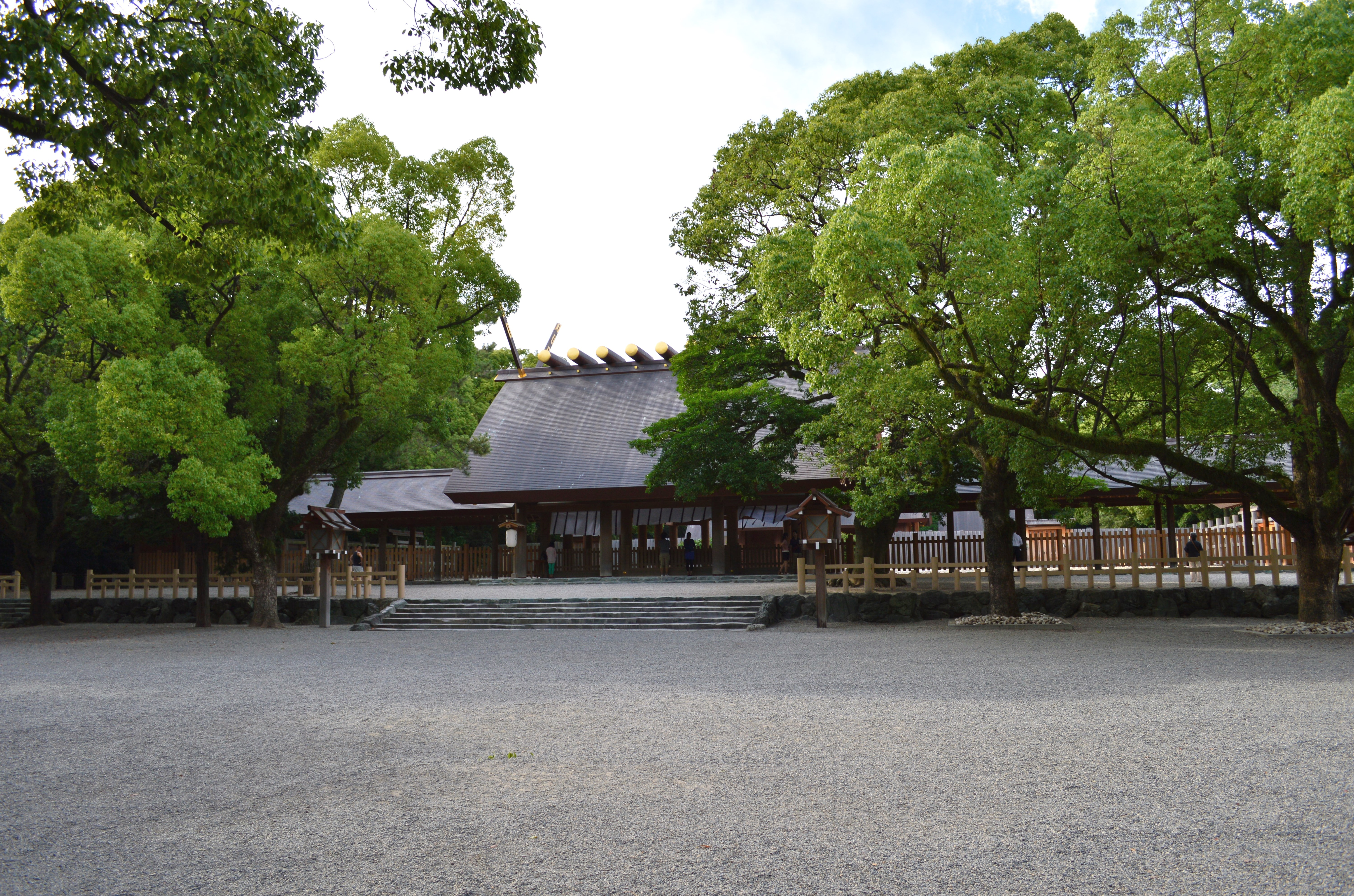 熱田神宮 境内